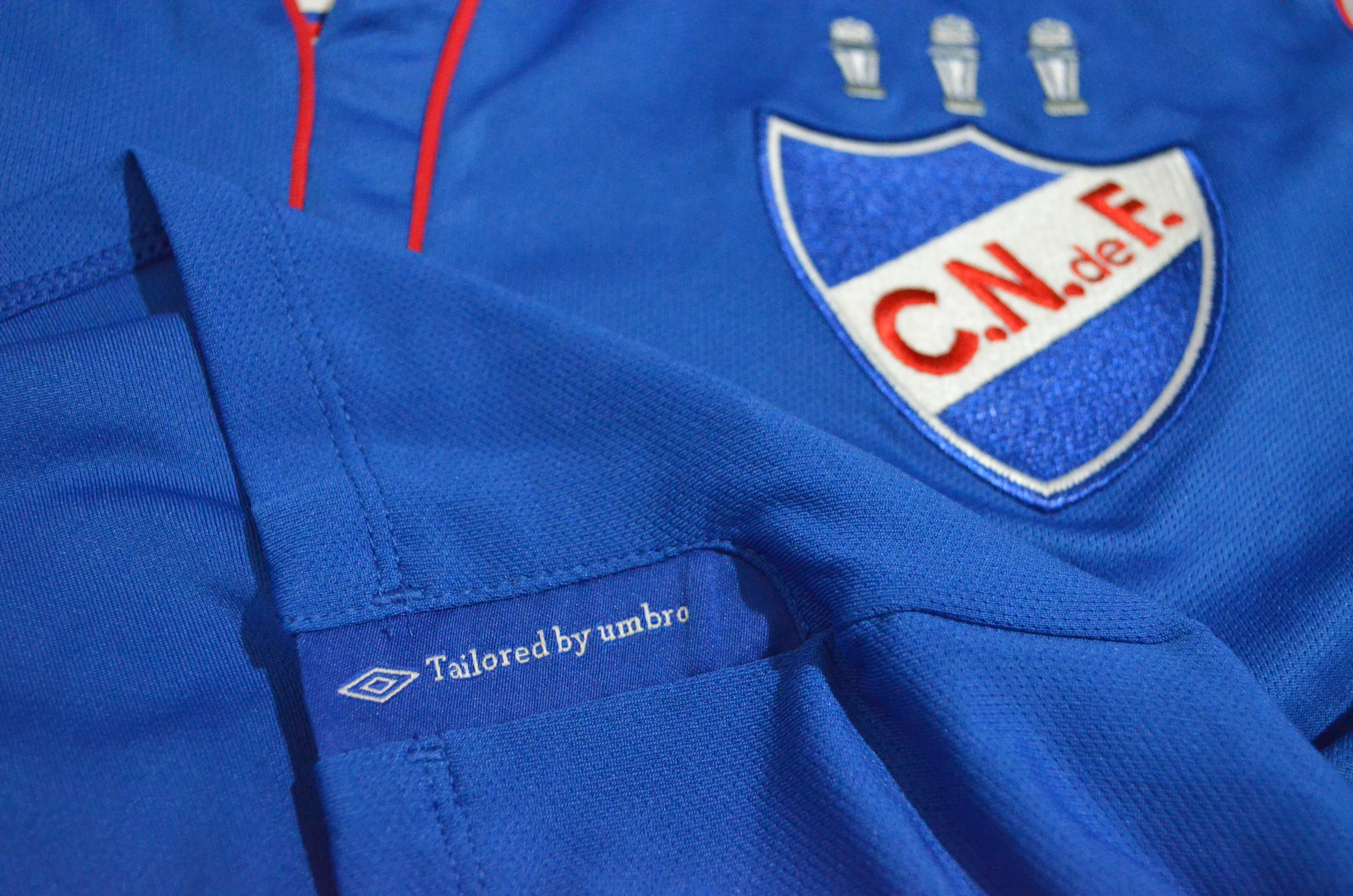 Uniforme de Nacional, hecho por Umbro